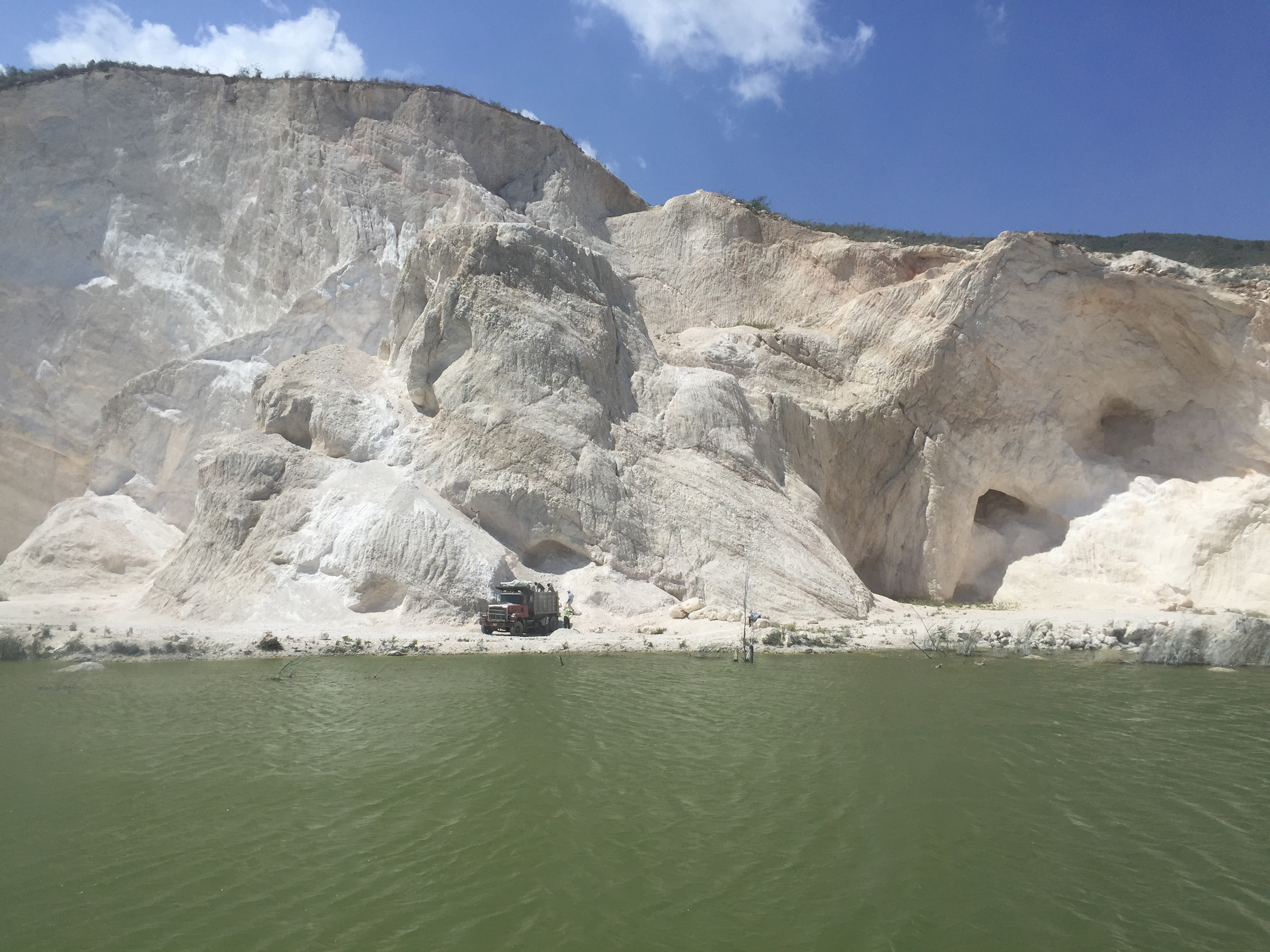 Ouest Department, Haiti